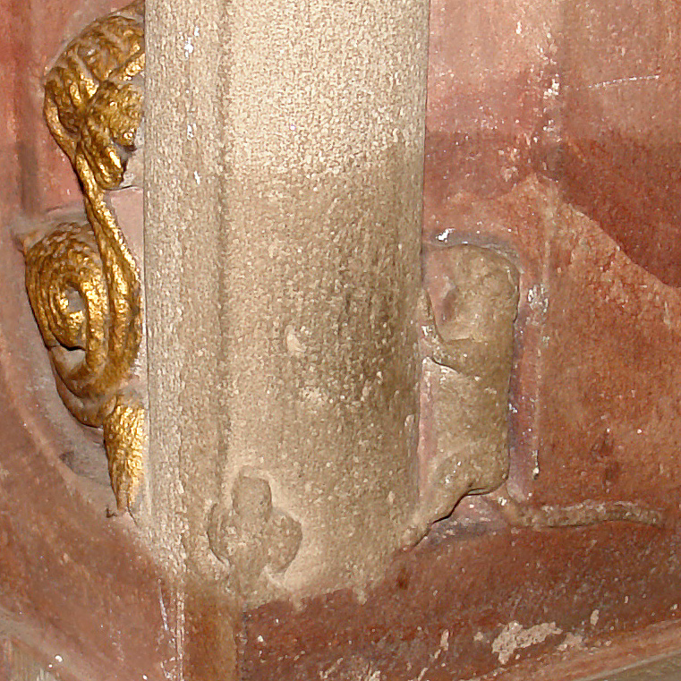 St. Petri Dom in Bremen. Die Maus an einer Tür im Chor